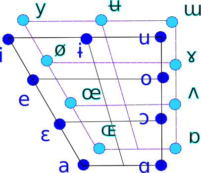 dimensional Jones chart